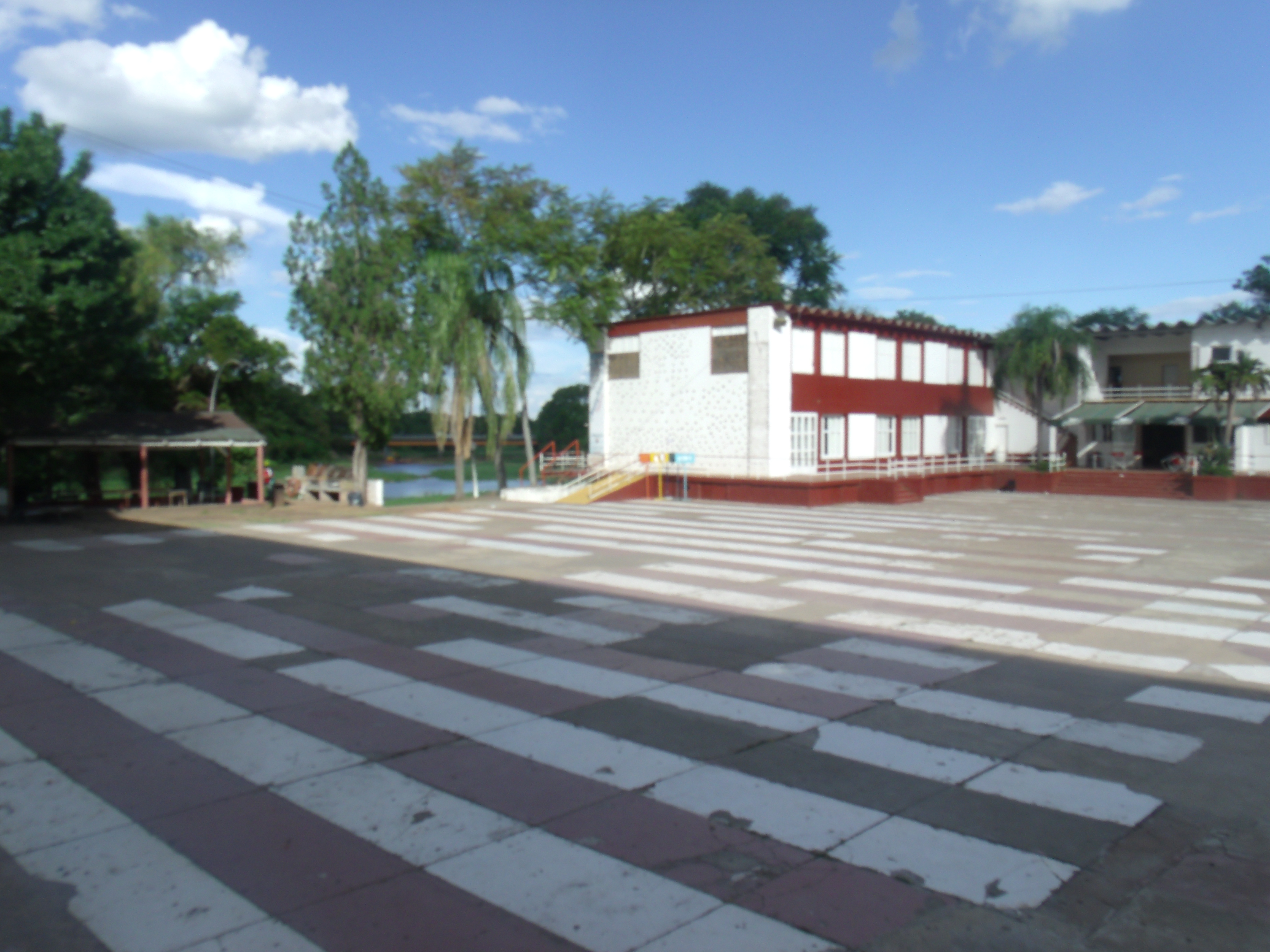 Vista del playón del Club de Regatas Resistencia desde la cancha de básquet al aire libre